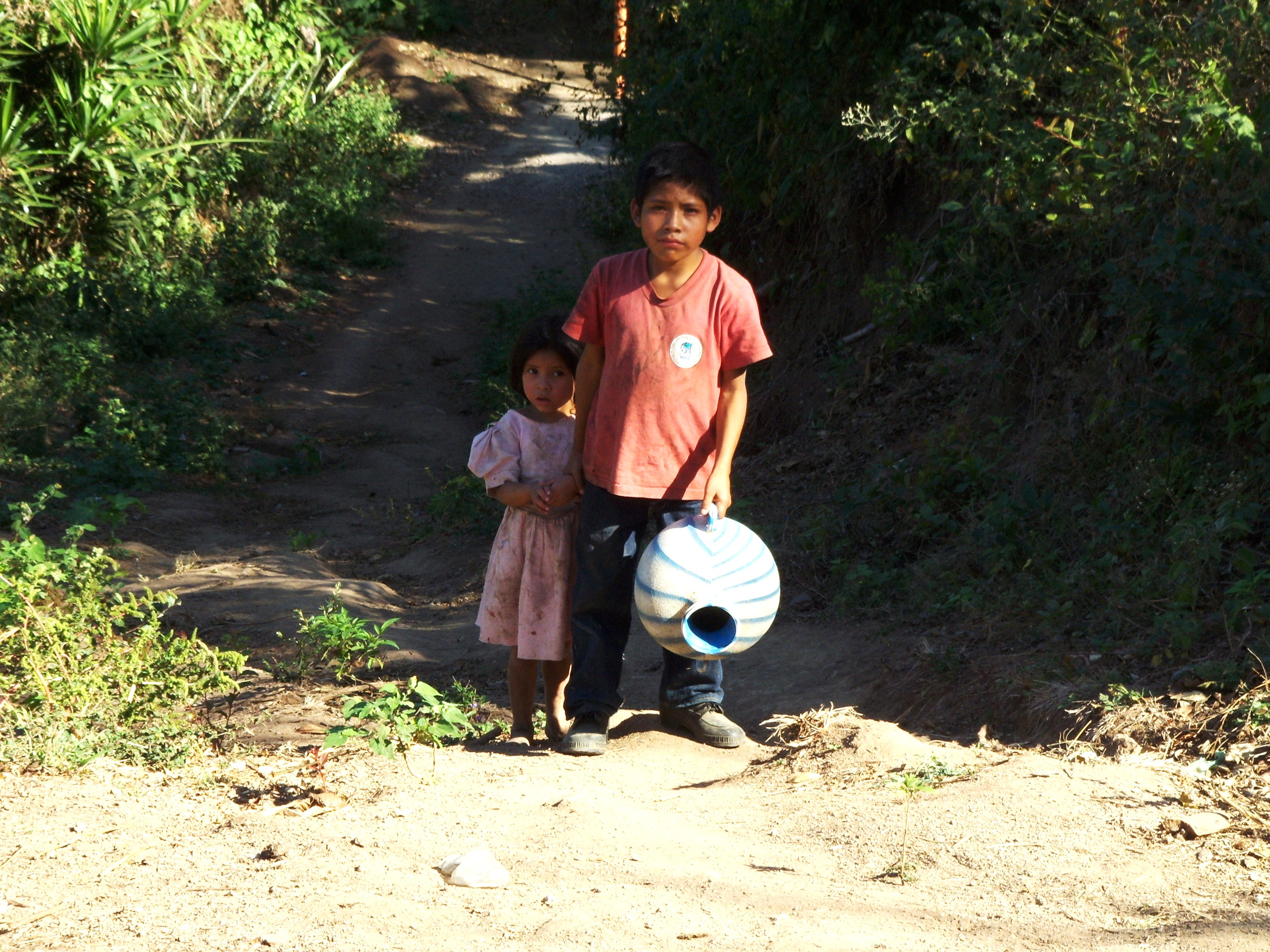 Niños buscando agua para el consumo familiar. Caserío La Cumbre, Aldea Nearar, Municipio Camotán, Departamento Chiquimula, Guatemala